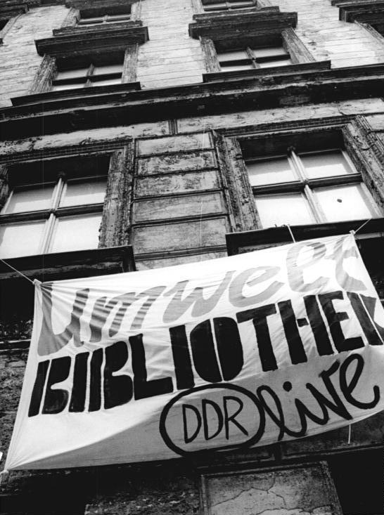 Berlin, Umweltbibliothek, Fassade ADN-ZB Oberst 17.1.90 Berlin: Umweltbibliothek- Die Umweltbibliothek der Zionskirchgemeinde hat ein vorläufiges Domizil in der Lottumstraße im Prenzlauer Berg gefunden. Das nicht zur Rekonstruktion vorgesehene Haus wurde für diesen Zweck von den gegenwärtigen Rechtsträgern besetzt, die sich in den nächsten Tagen mit ihrem Anliegen präsentieren wollen.